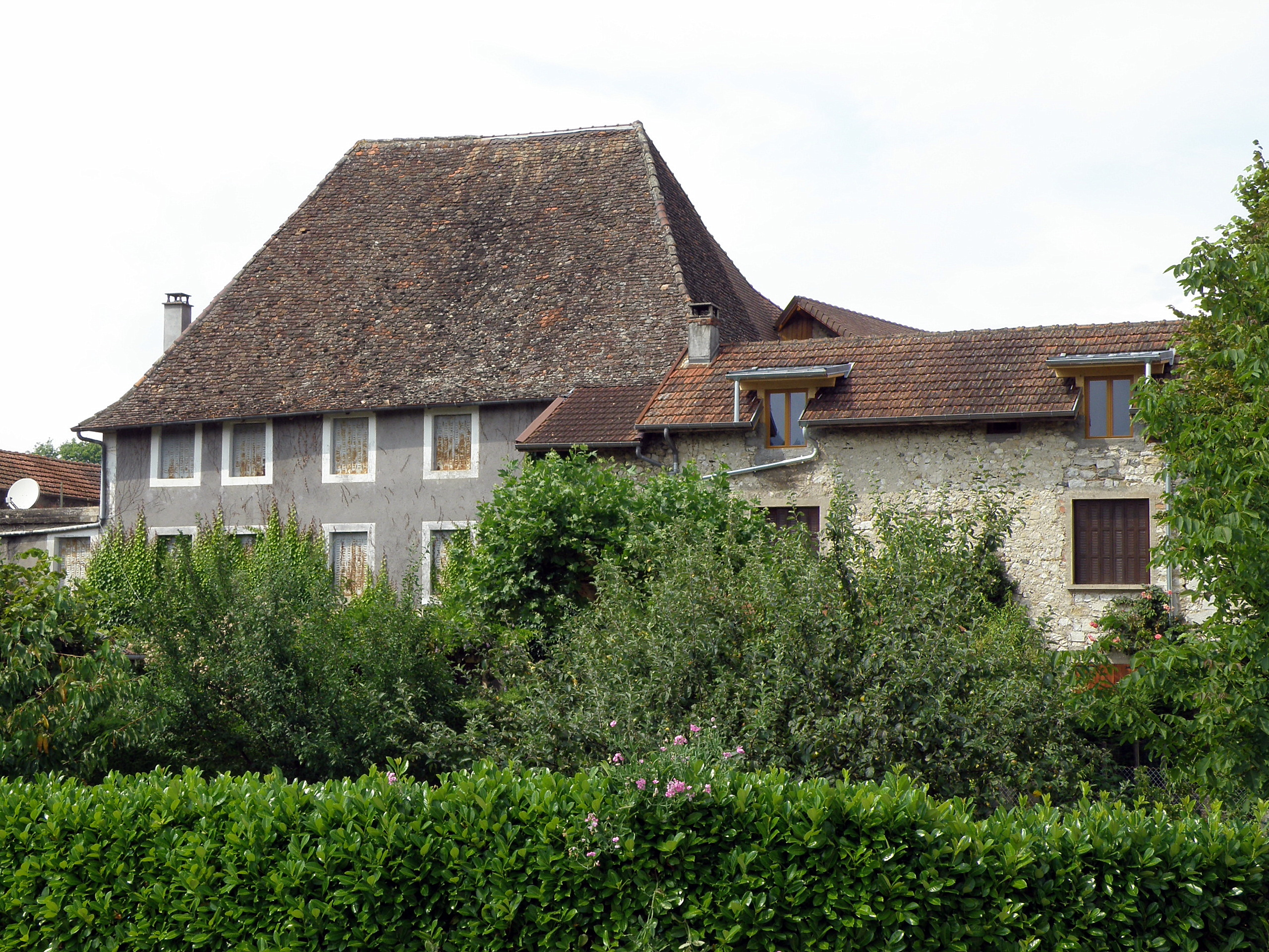 Billième (dép. de la Savoie, France). Château de Billième.